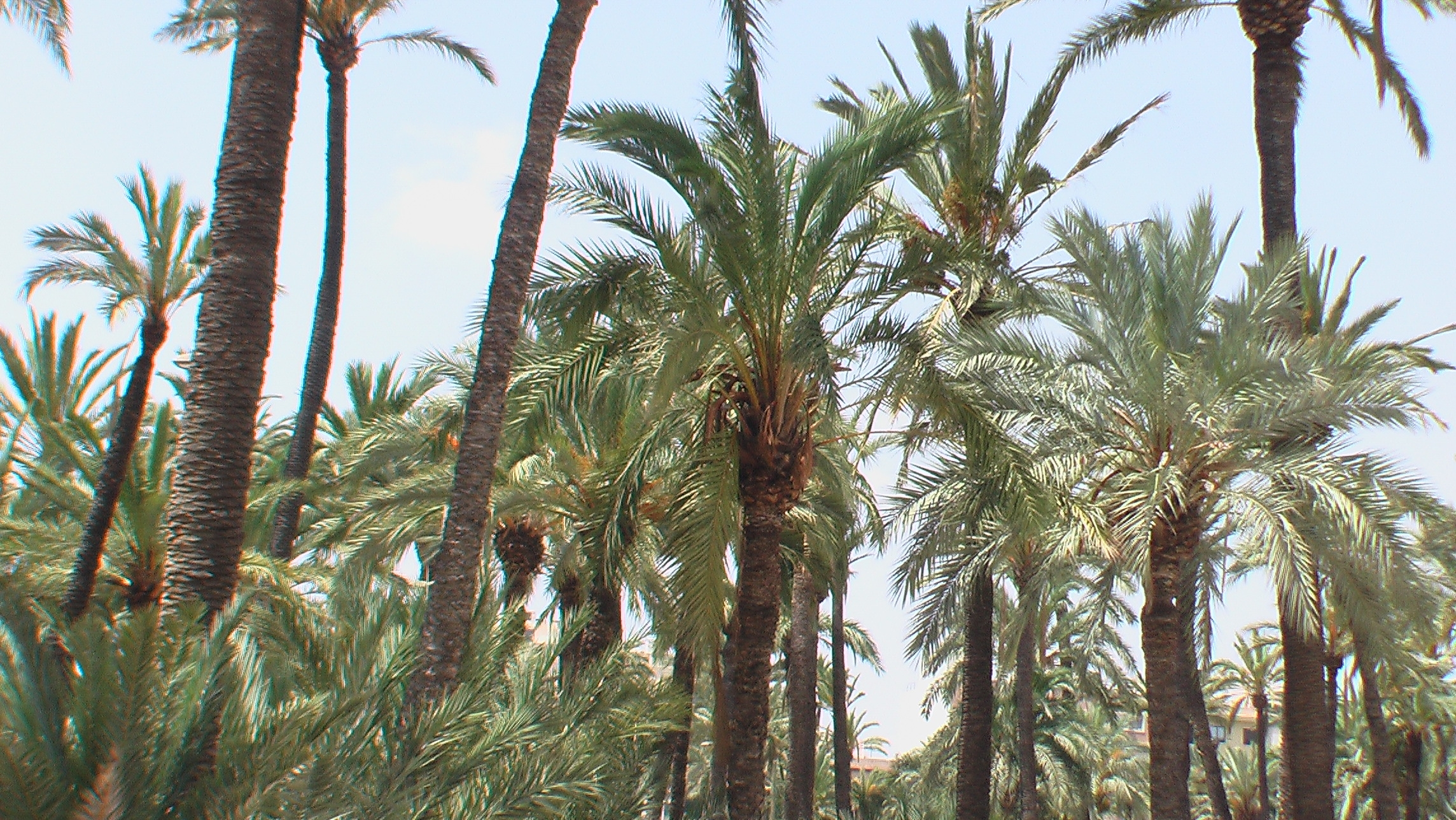 Palmenhain in Elche